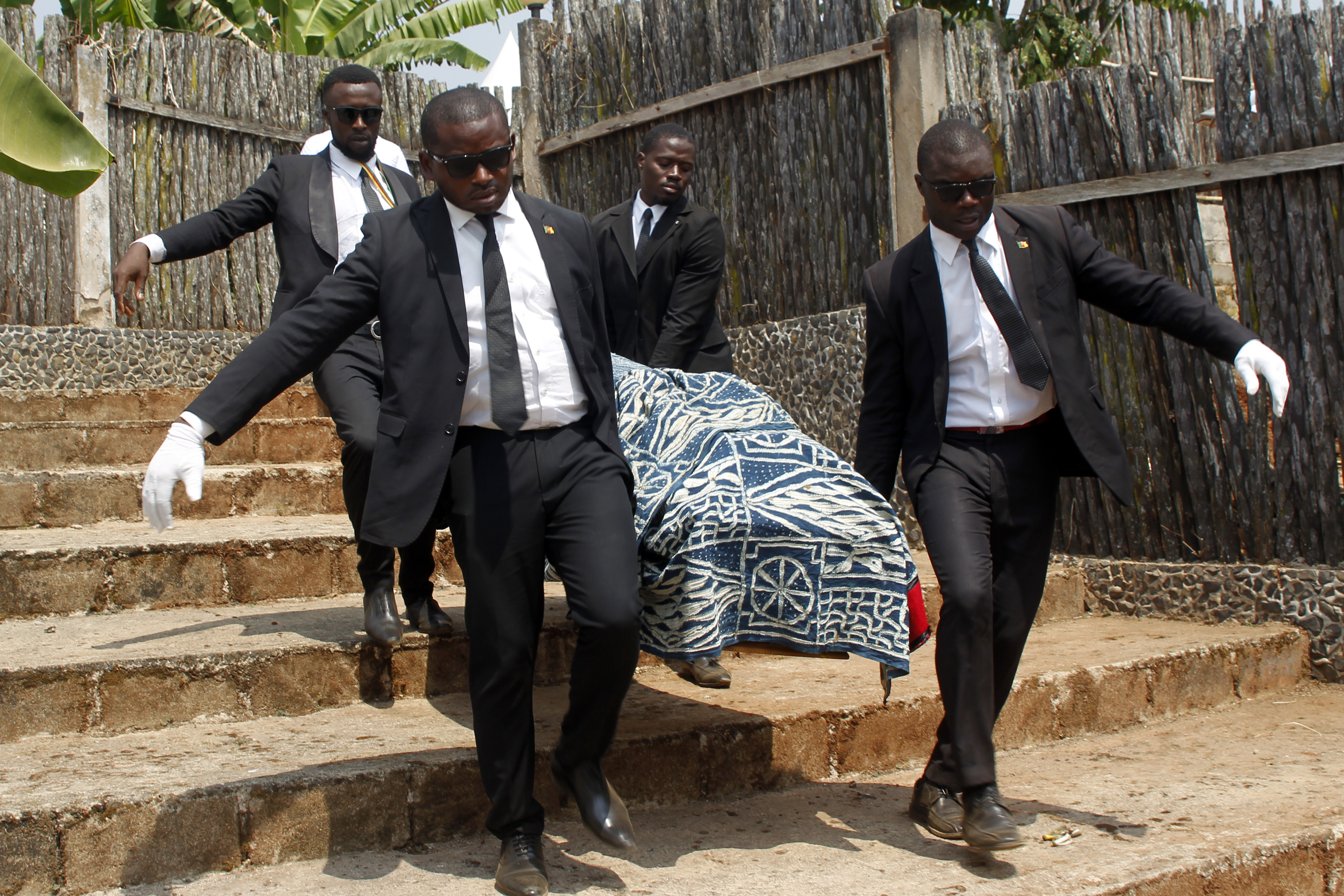 Un corps d’élites spécialisé dans le transport des dépouilles à Bana au Cameroun. This is an image with the theme "Africa on the Move or Transport" from: Cameroon